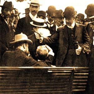 Machado de Assis é acudido na rua numa de suas crises de epilepsia.